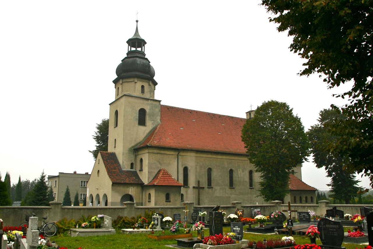 Januszkowice, ul. Kościelna 3 – rzymskokatolicki kościół parafialny p.w. św. Błazeja, 1934-1936